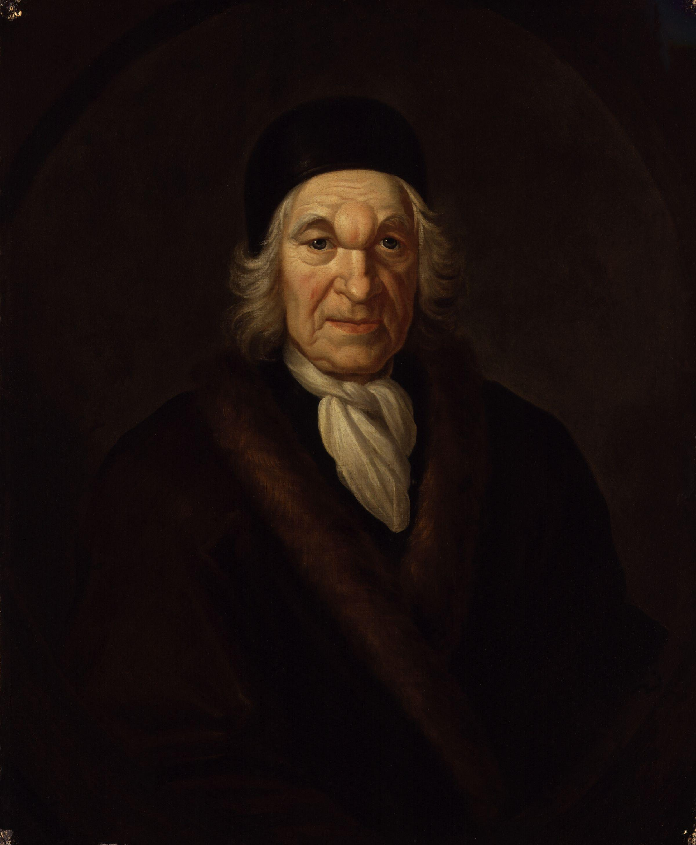 Portrait of Charles de Marquetel de Saint-Evremond (1613-1703)